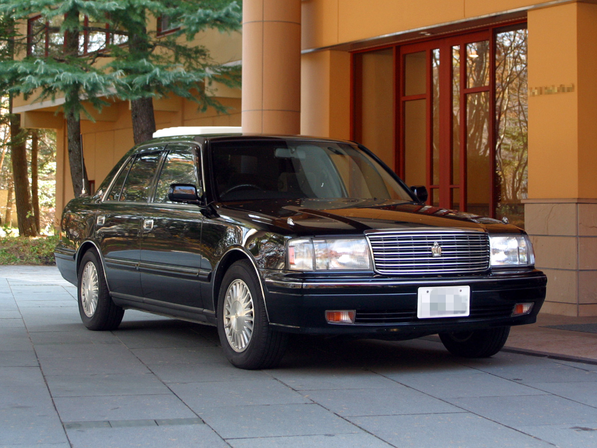 TOYOTA CROWN SEDAN JZS155 Royal Saloon-G 1996